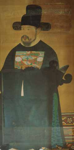 이항복 18th